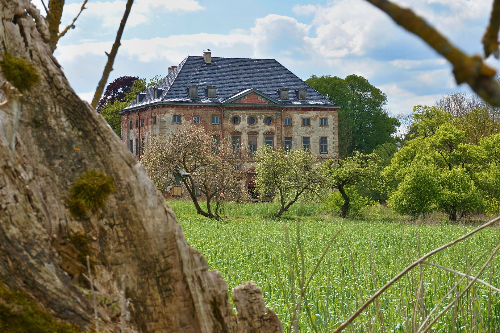 Barockschloss bei Laage